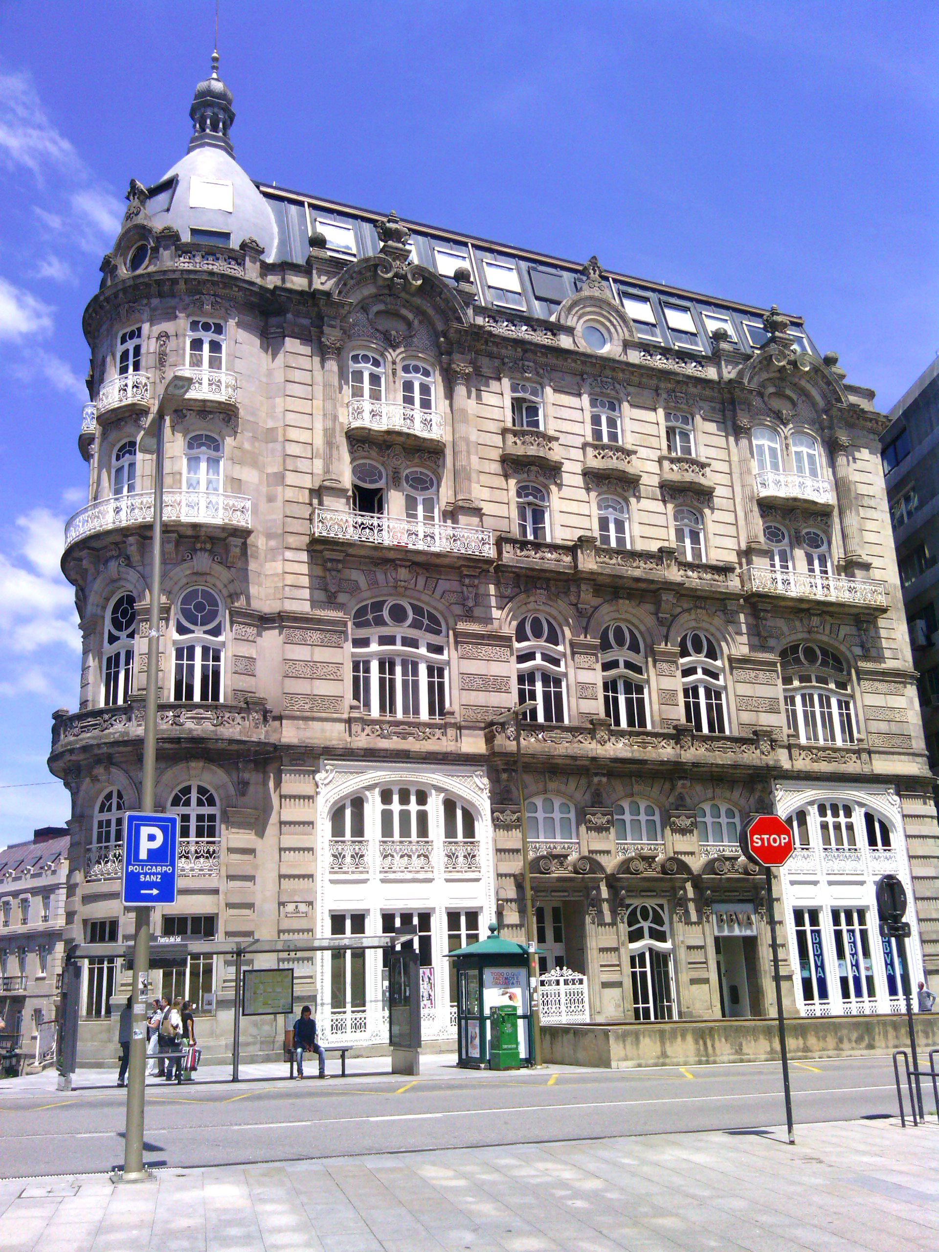 Foto del Edificio El Moderno